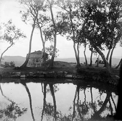 Imatge